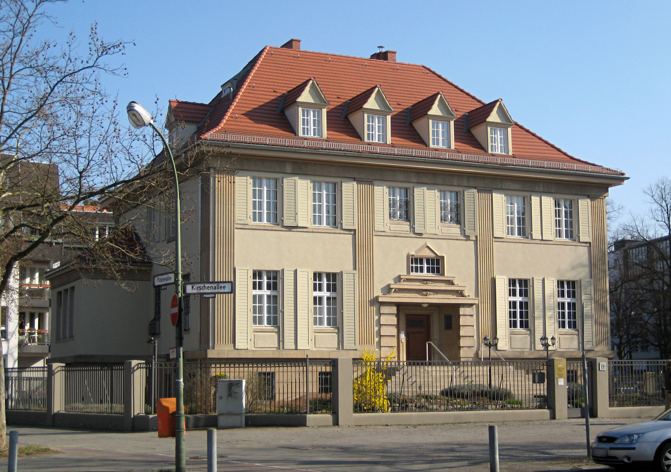 Namibian Embassy, Berlin; Reichsstraße 17 (Goldstein-Villa)